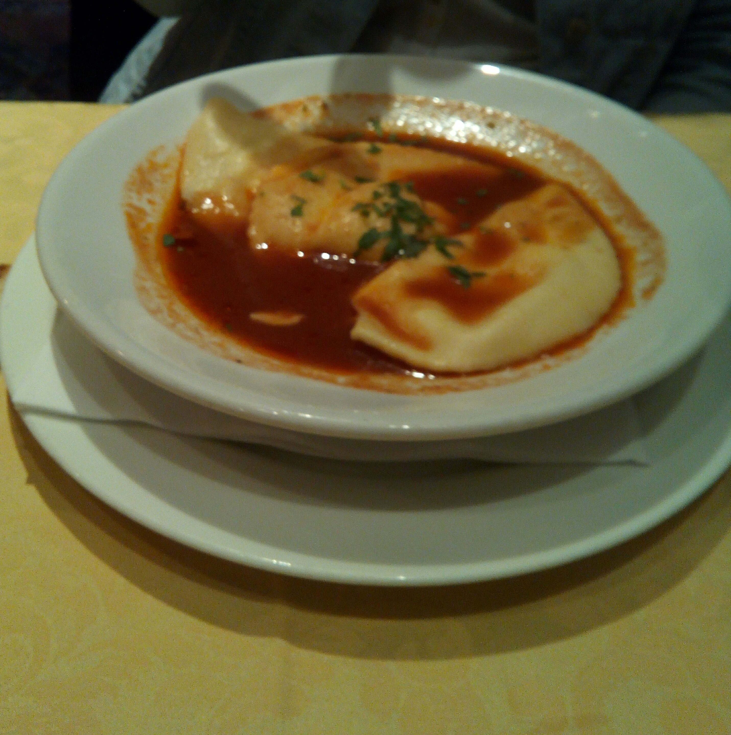 Cassatelle trapanesi di ricotta in brodo di pesce